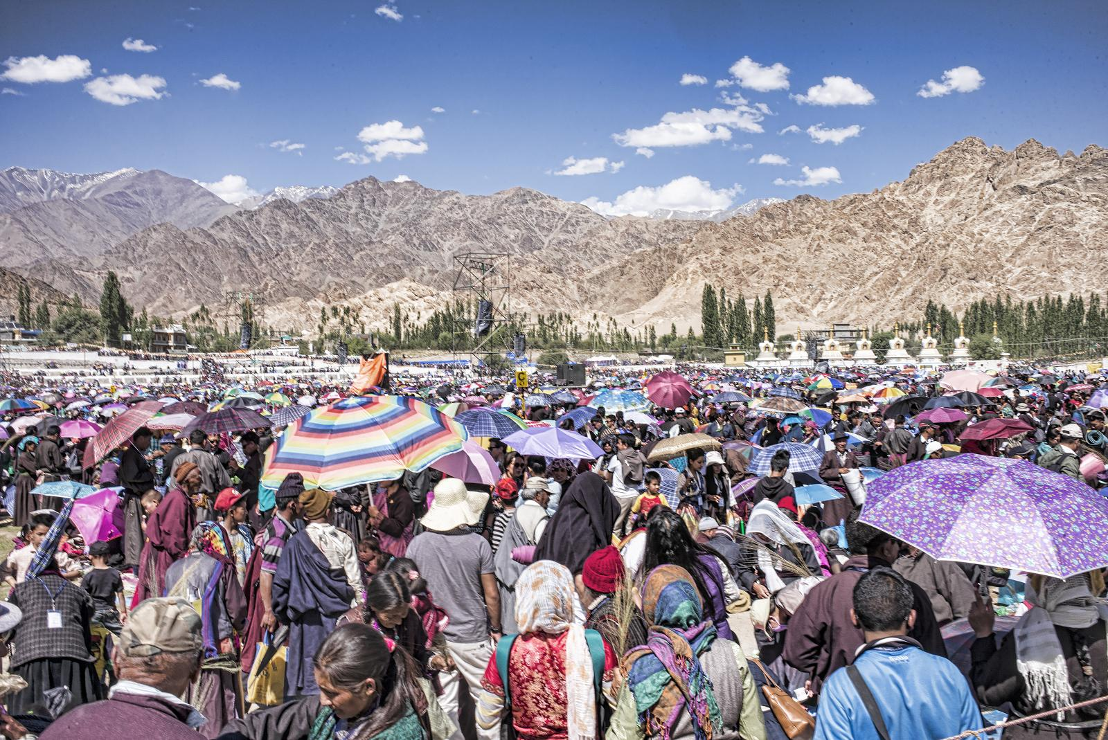 Ladakh